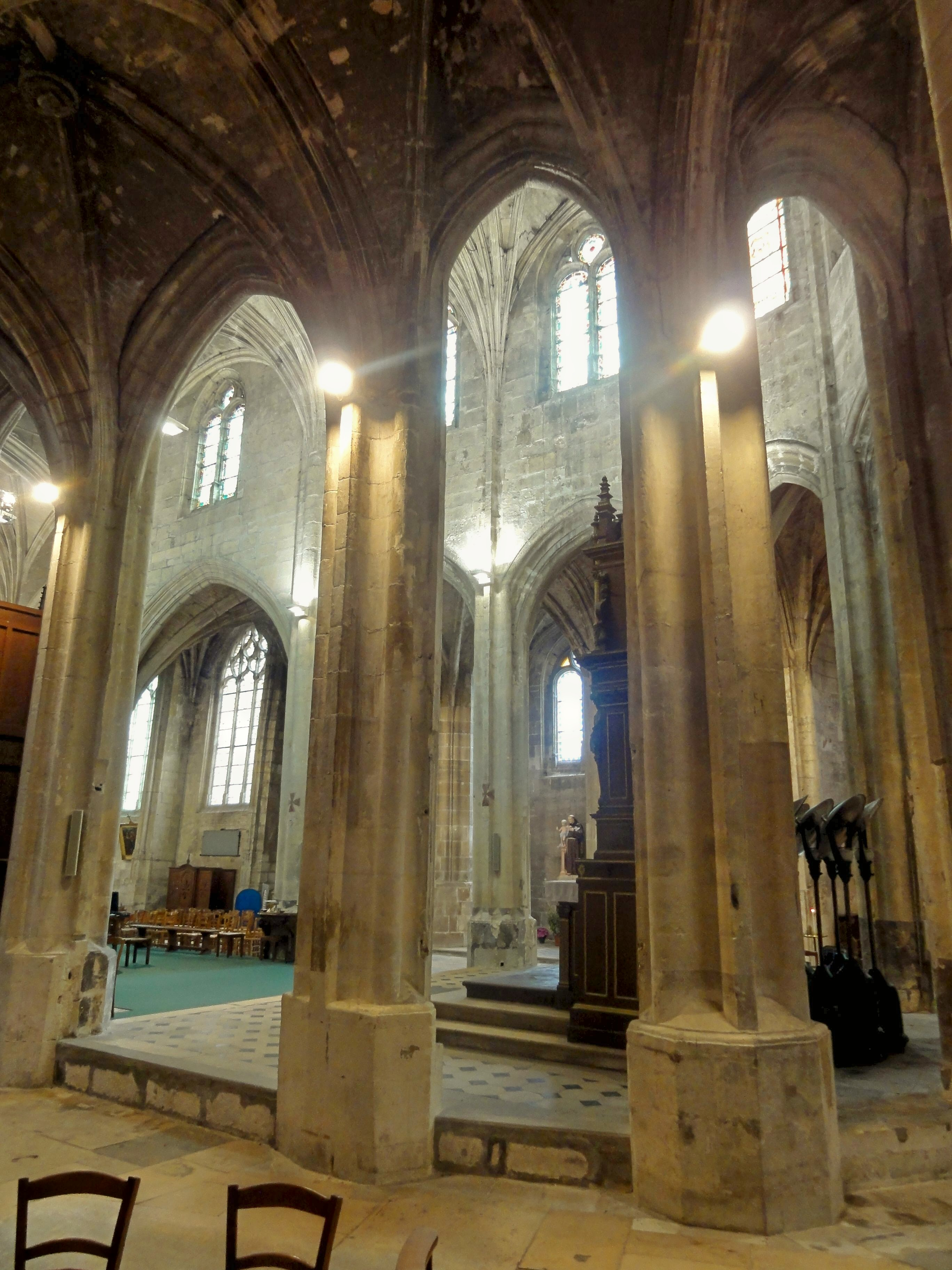 Déambulatoire, grandes arcades au sud-est.